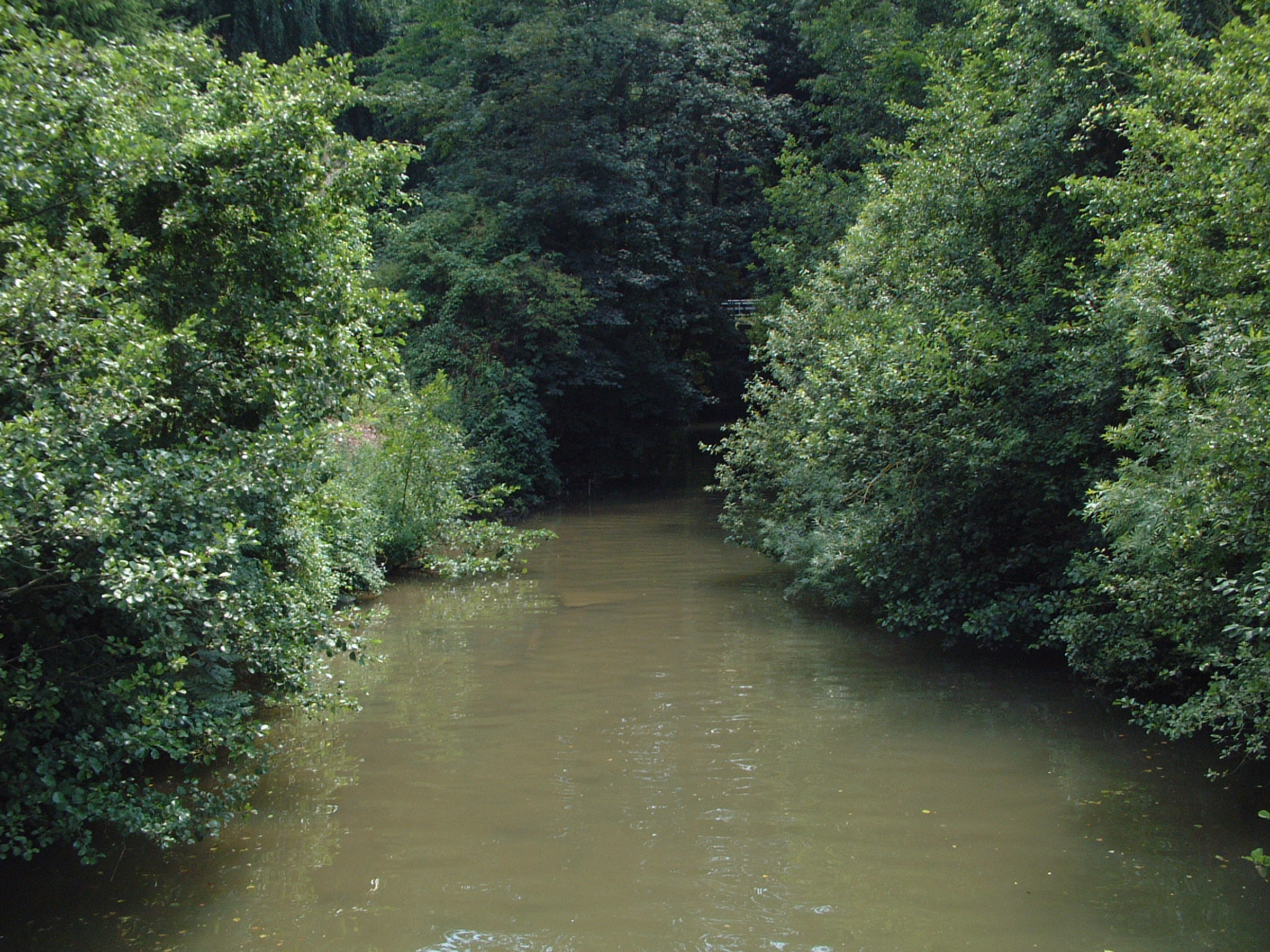 Le Samson juste avant son embouchure